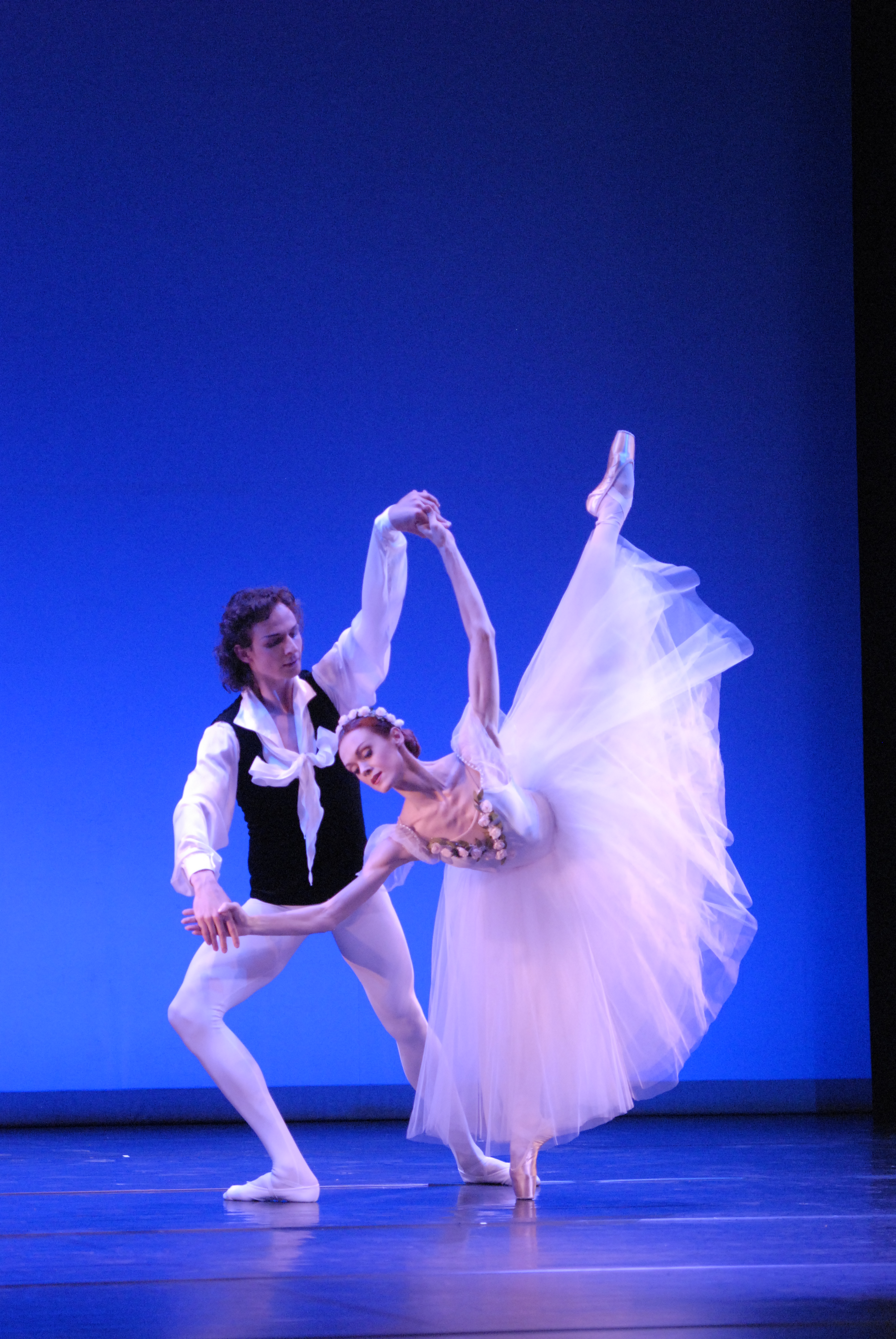 Ouliana Lopatkina au festival Le Mois Molière en juin 2010.